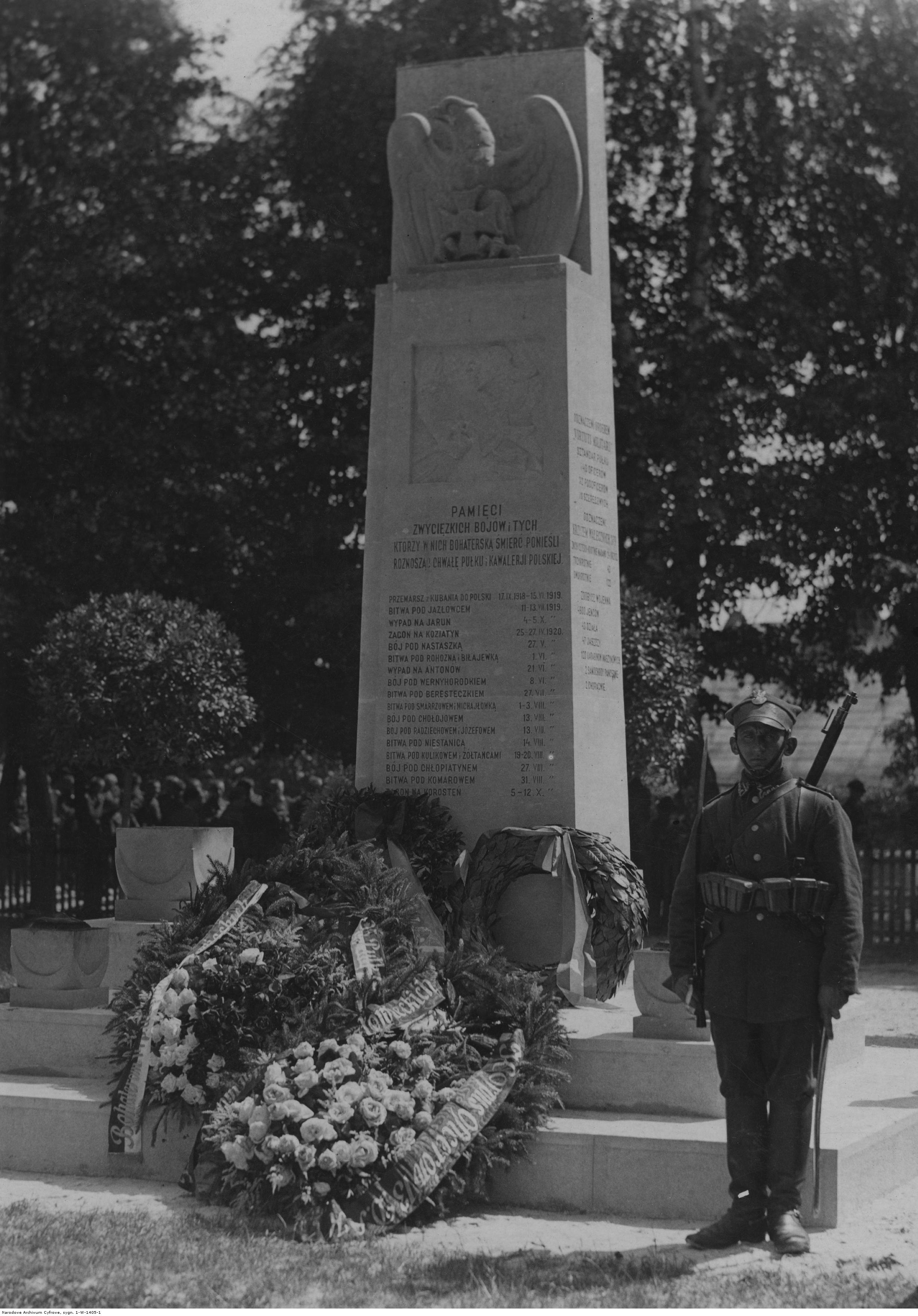 Pomnik ku czci poległych żołnierzy 14 Pułku Ułanów Jazłowieckich we Lwowie - warta przed pomnikiem; lipiec 1933. Koncern Ilustrowany Kurier Codzienny - Archiwum Ilustracji. Sygnatura: 1-W-1405-1